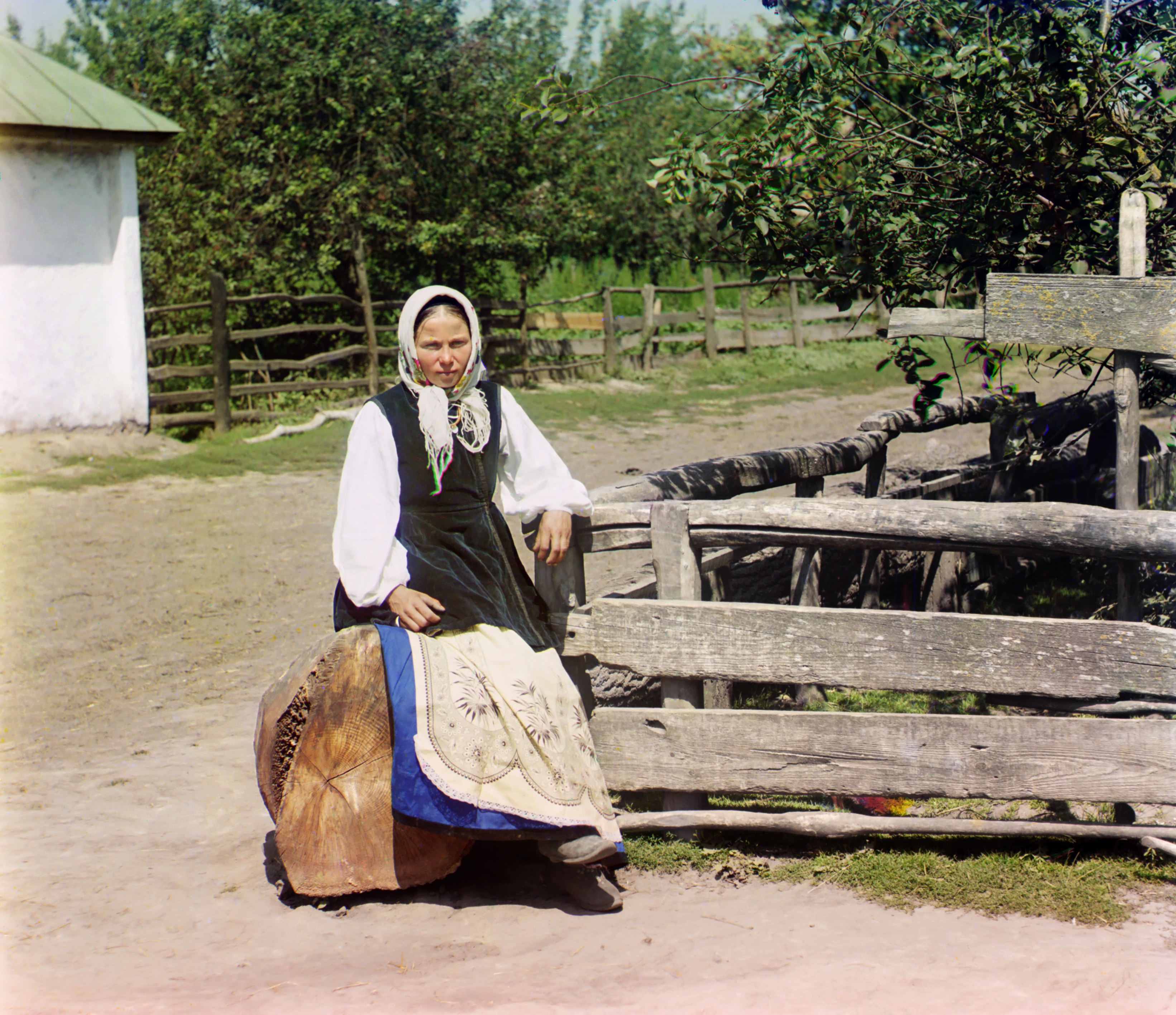 Малороссия (современная Украина) Малороссиянка. Близ Путивля Курской губернии, 1904 г.. In Little Russia [i.e. Ukraine].